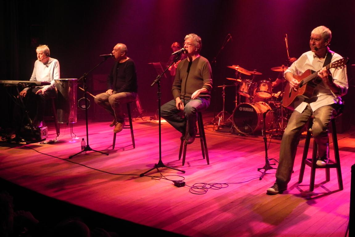 MPB4 em Curitiba